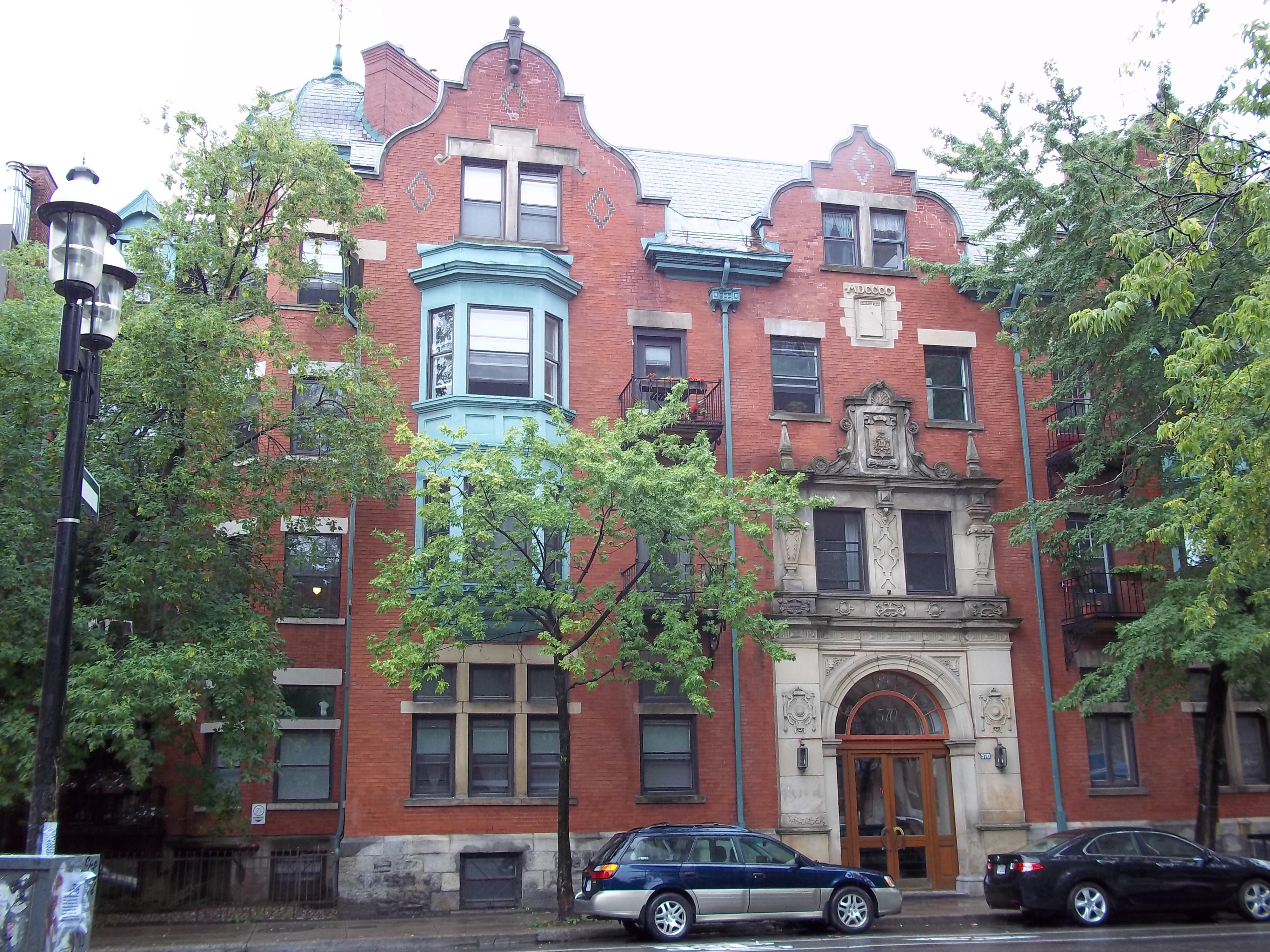 Les Appartements Marlborough, Montréal